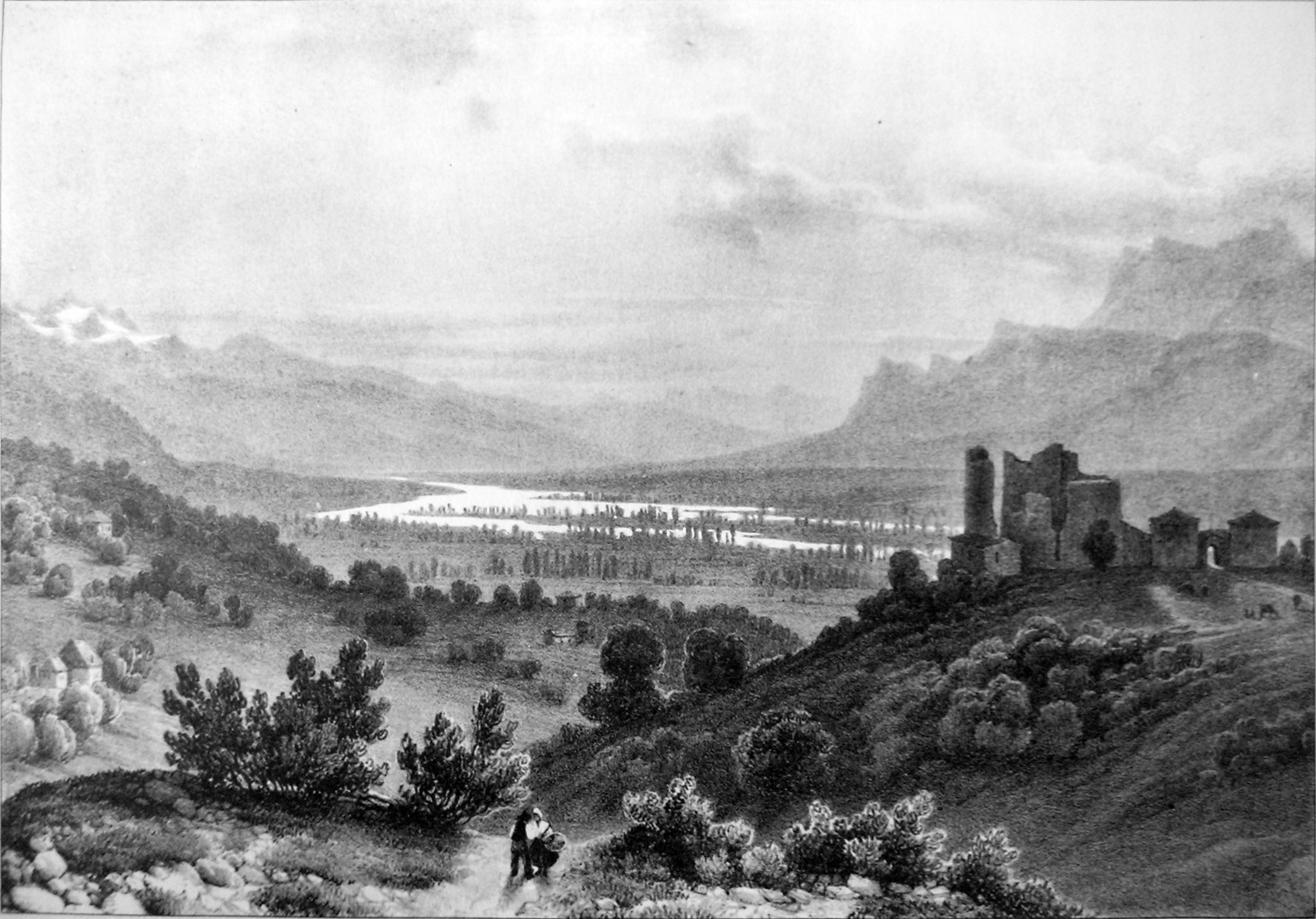 Chateau BayardATTENTION ! Ce facsimilé est réalisé en applicant des alterations avec un logiciel graphique à une copie numérique, obtenue à partir d'une prise de photo faite par un non-professionnel. Elle pourrait ne pas être parfaitement réussie.